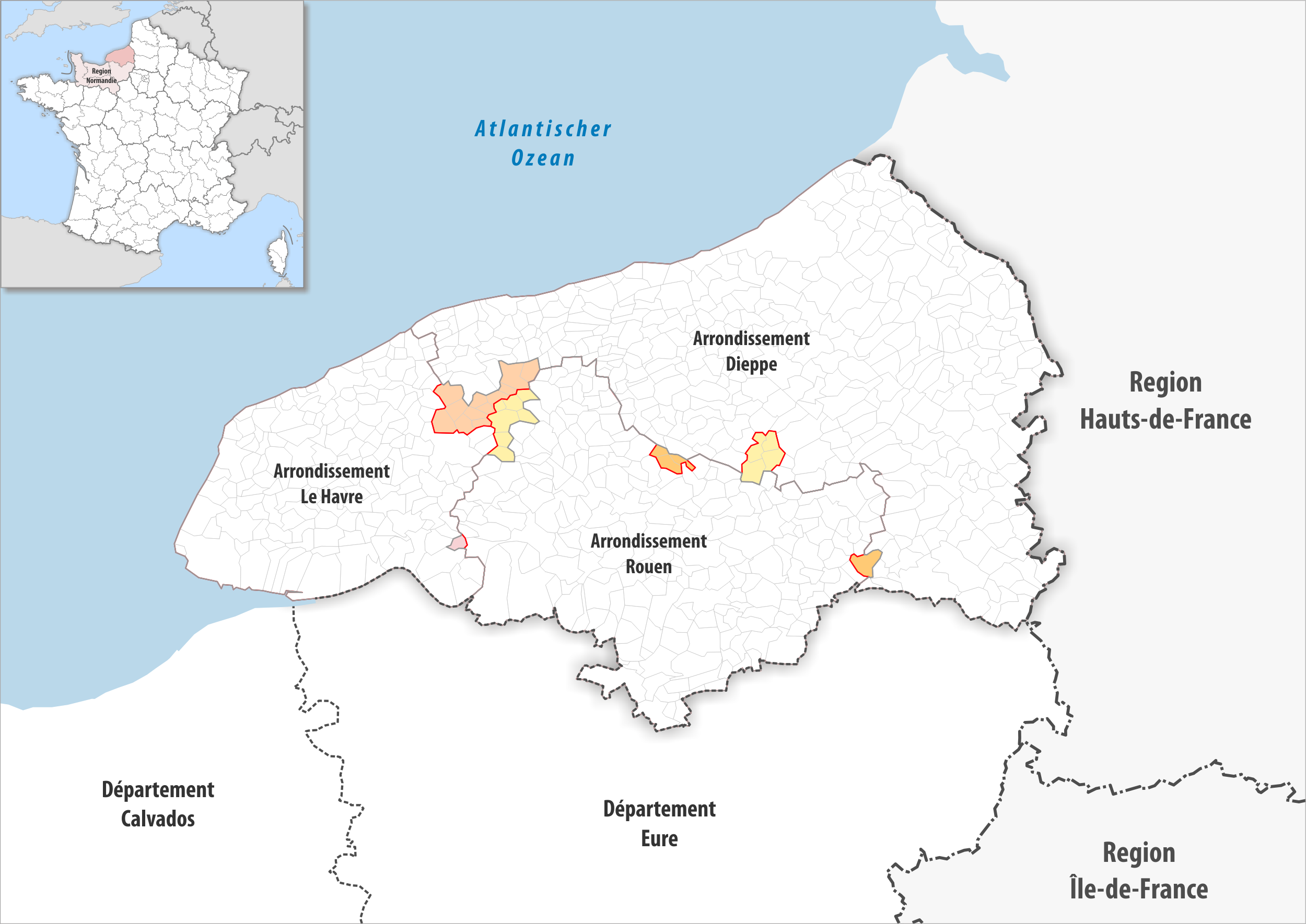 Arrondissements Anpassungen auf 2017 im Departement Seine-Maritime